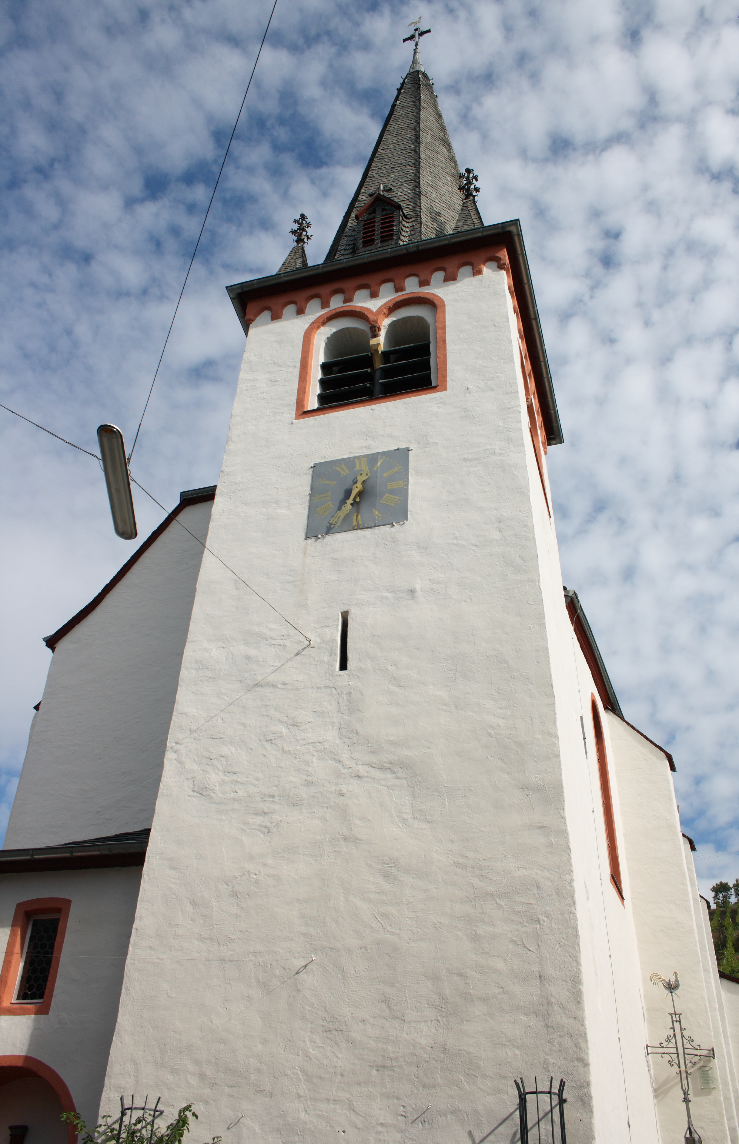 Katholische Pfarrkirche St. Nikolaus in Mesenich im Landkreis Cochem-Zell (Rheinland-Pfalz), romanischer Westturm, um 1200